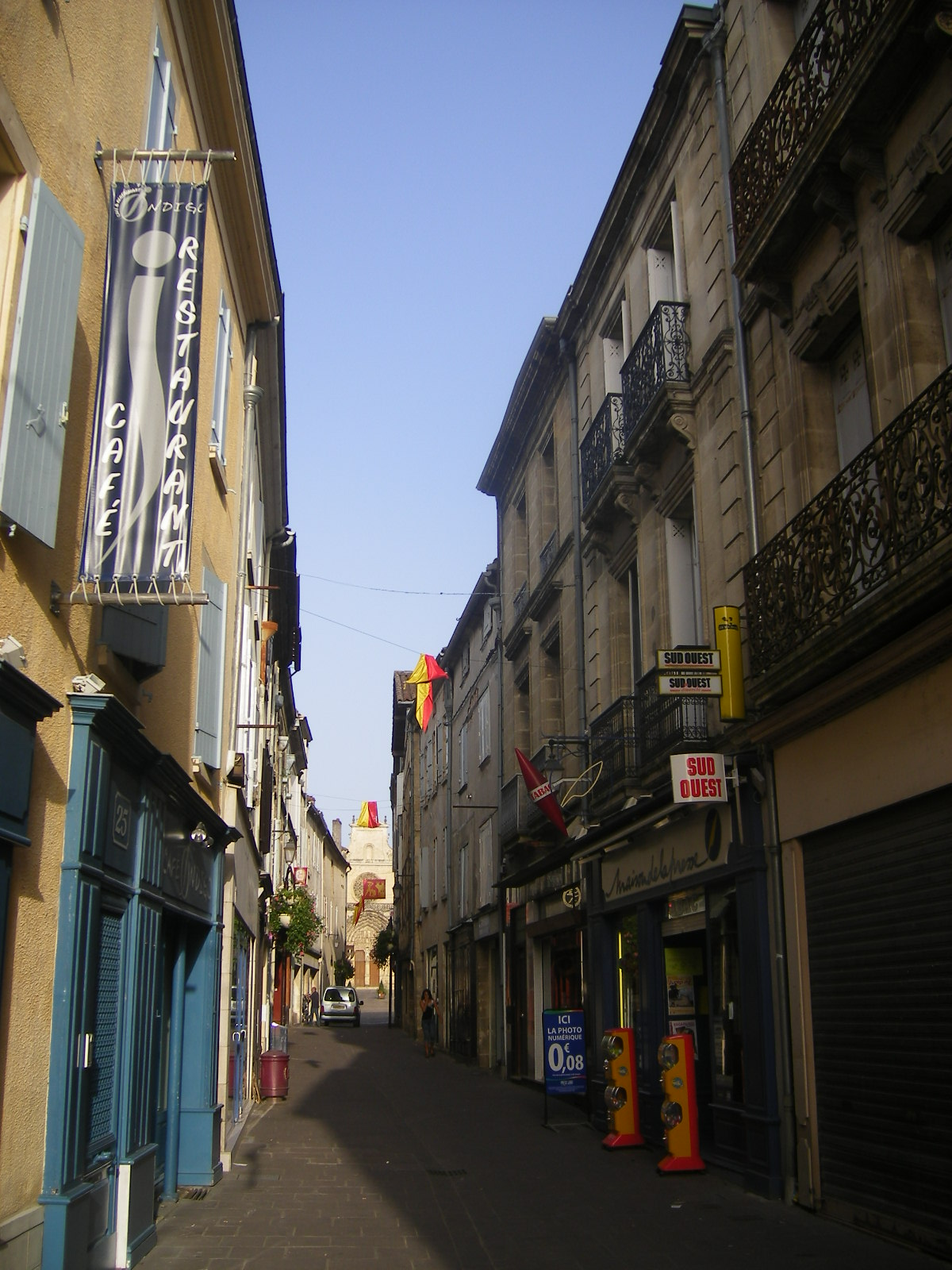 Bazas